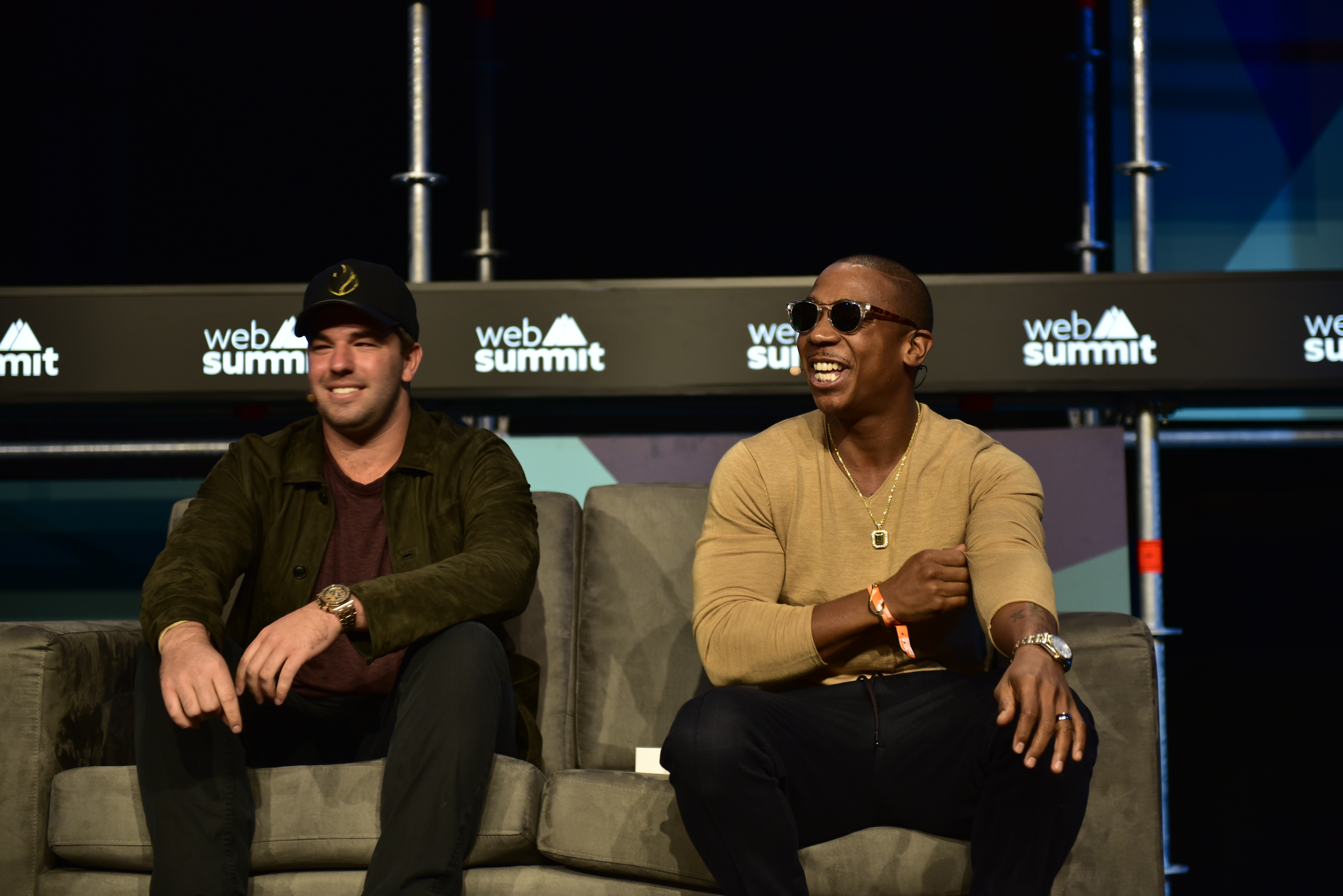 _DSC0839